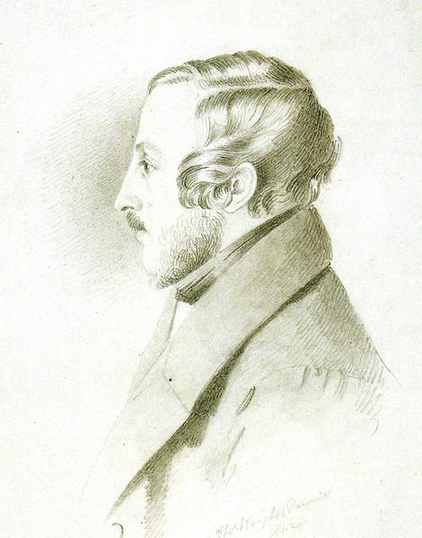 Алексей Васильевич Шереметев (1800 - 1857).